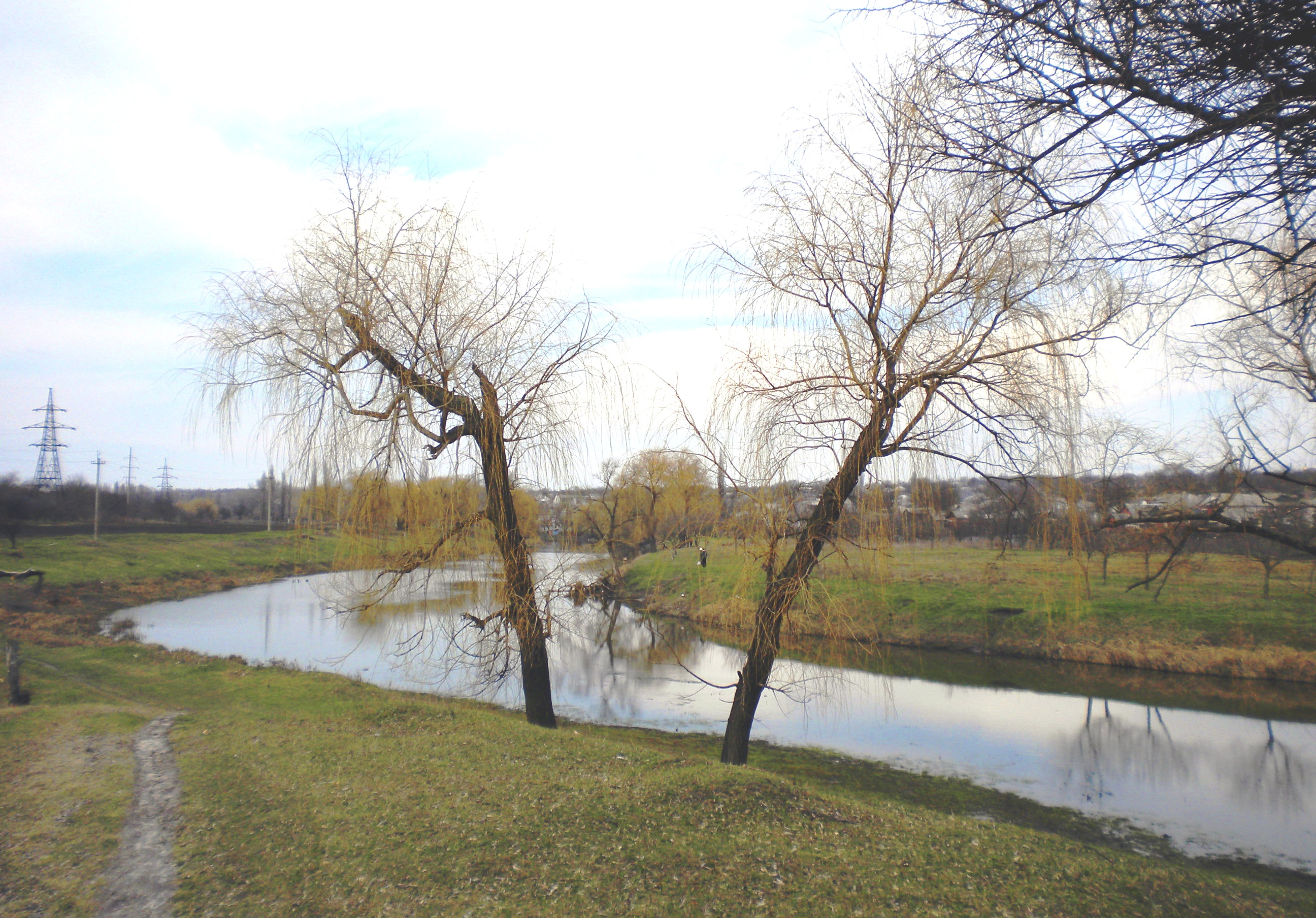 Інгулець трохи вище від впадіння в нього Березівки. Олександрія